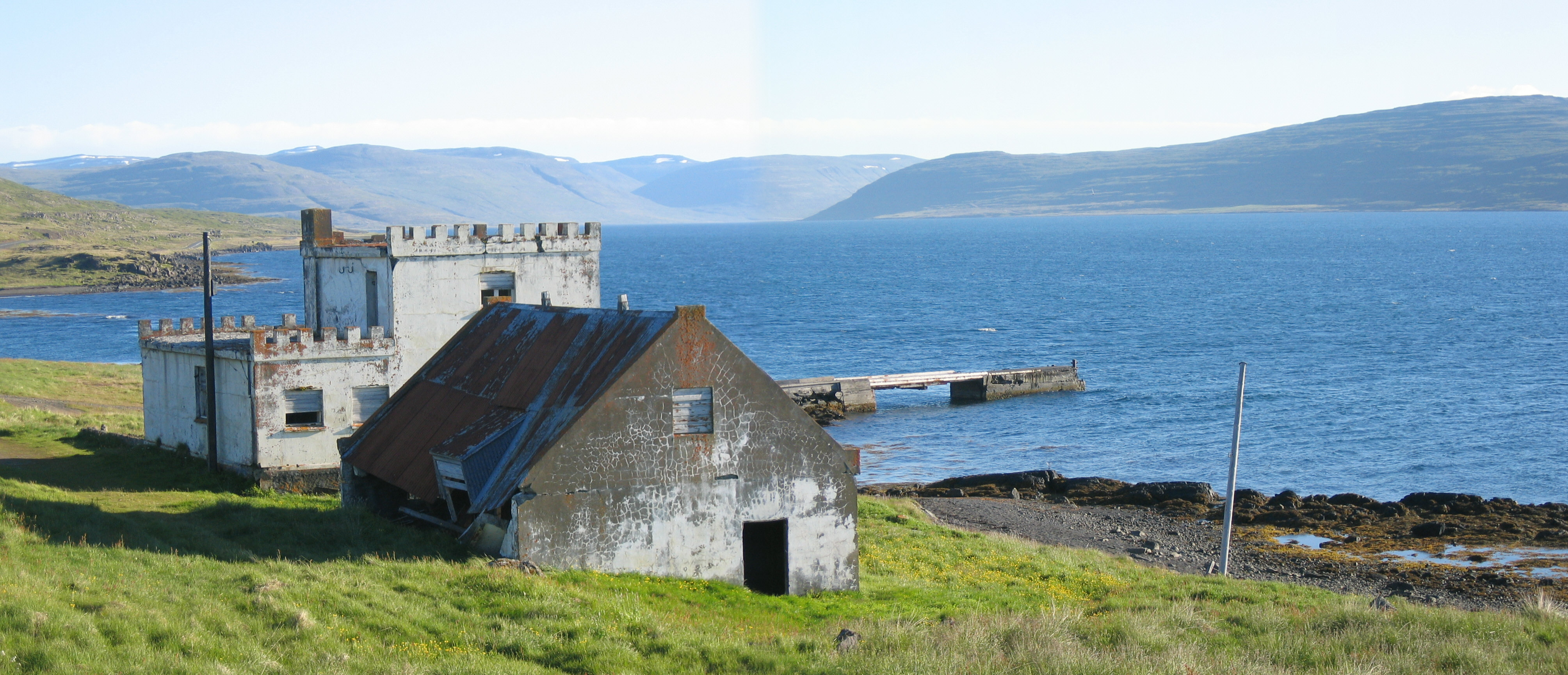 Ísafjarðardjúp Salvor Gissurardóttir